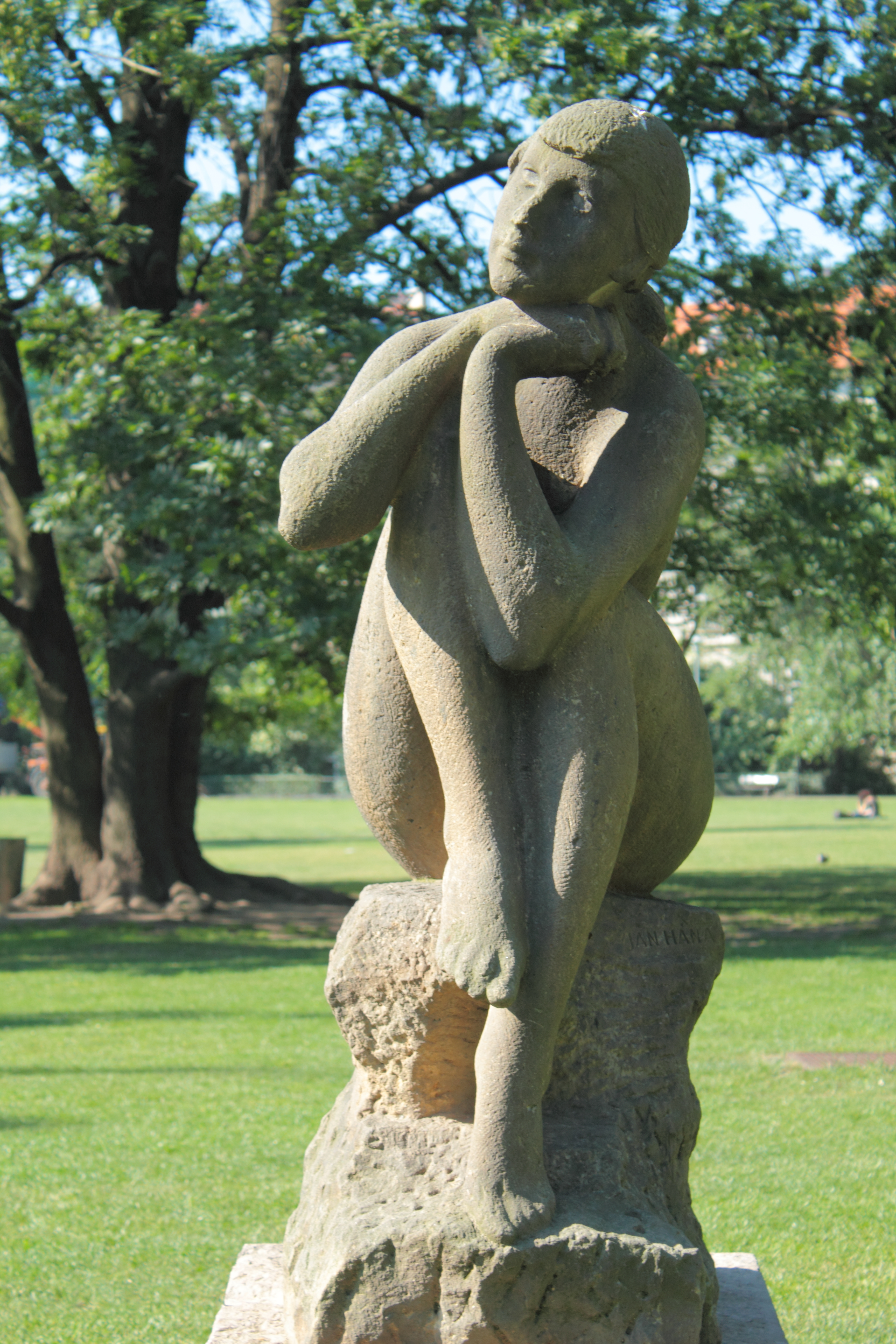 Česky: Sedící dívka (Jarmila), park na Kampě (Jan Hána, 1958)